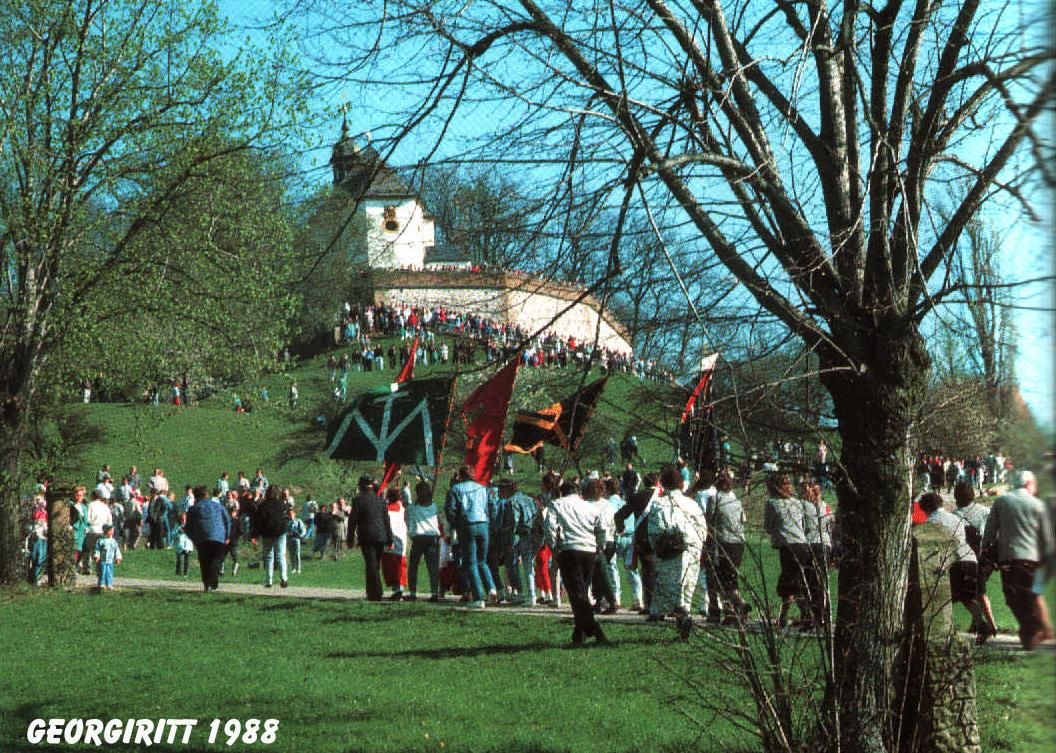 GeorgirittSenftenberg